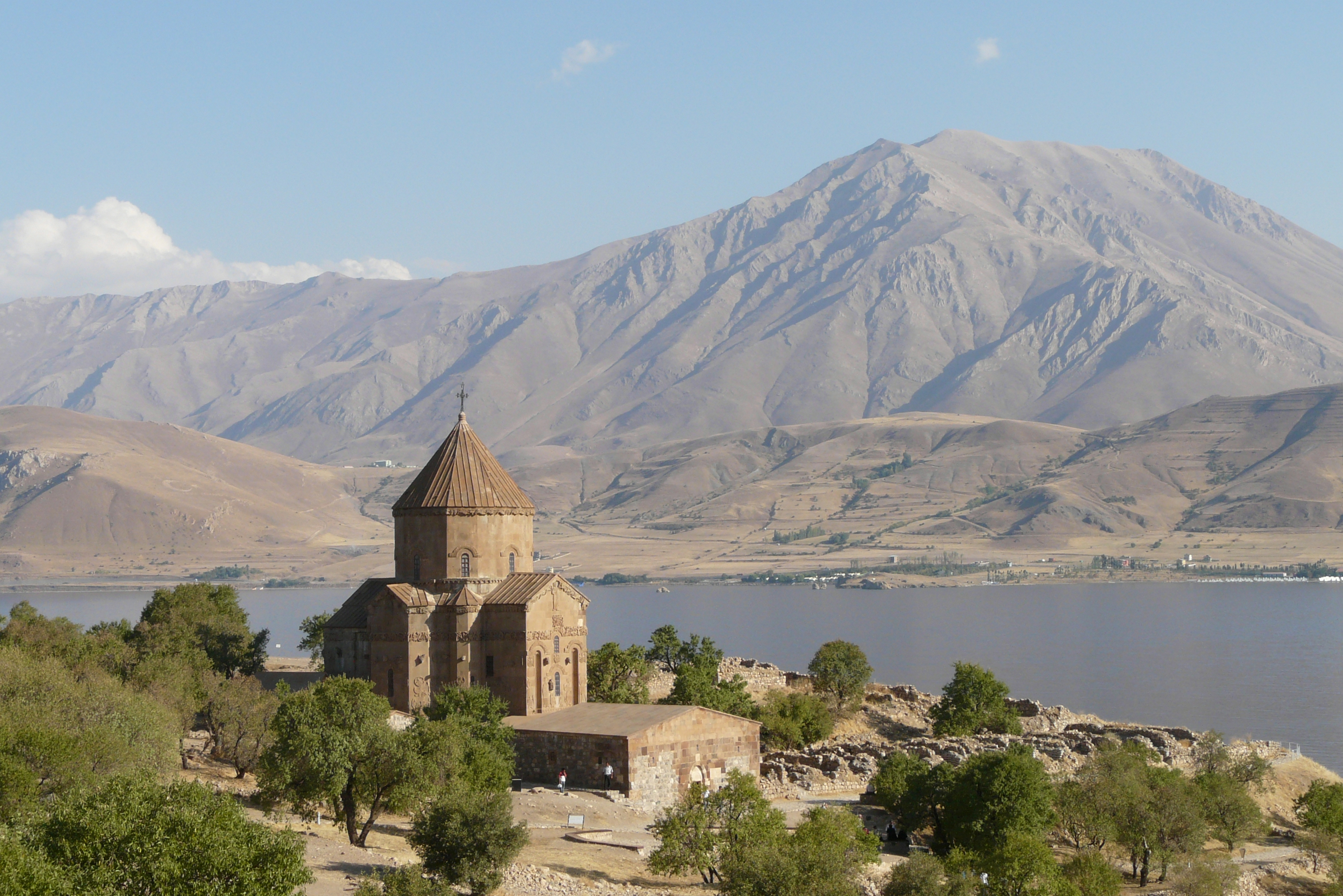 Im Hochland der östlichen Türkei liegt auf 1646 Metern Höhe über NN der Vansee (übrigens der drittgrößte abflusslose See auf der Erde), umgeben von Bergen und Vulkanen, die eine Höhe von 4000 m erreichen. Auf der nahe des Südufers in der Nordostausbuchtung des Sees gelegenen Insel Athamar befindet sich die Anfang des 10. Jahrhunderts errichtete Kirche zum Heiligen Kreuz, die zu einem schon länger bestehenden Kloster gehörte. Ein rundum verlaufender Fries mit Szenen aus der Heiligen Schrift ziert das Bauwerk in einmaliger Weise. 1951 entging es gerade noch dem Abriss. Nach Restaurierung wurde es 2007 als Kulturdenkmal wiedereröffnet. 2010 wurde nach Aufsetzung eines Kreuzes auf dem Turm ein Gottesdienst abgehalten